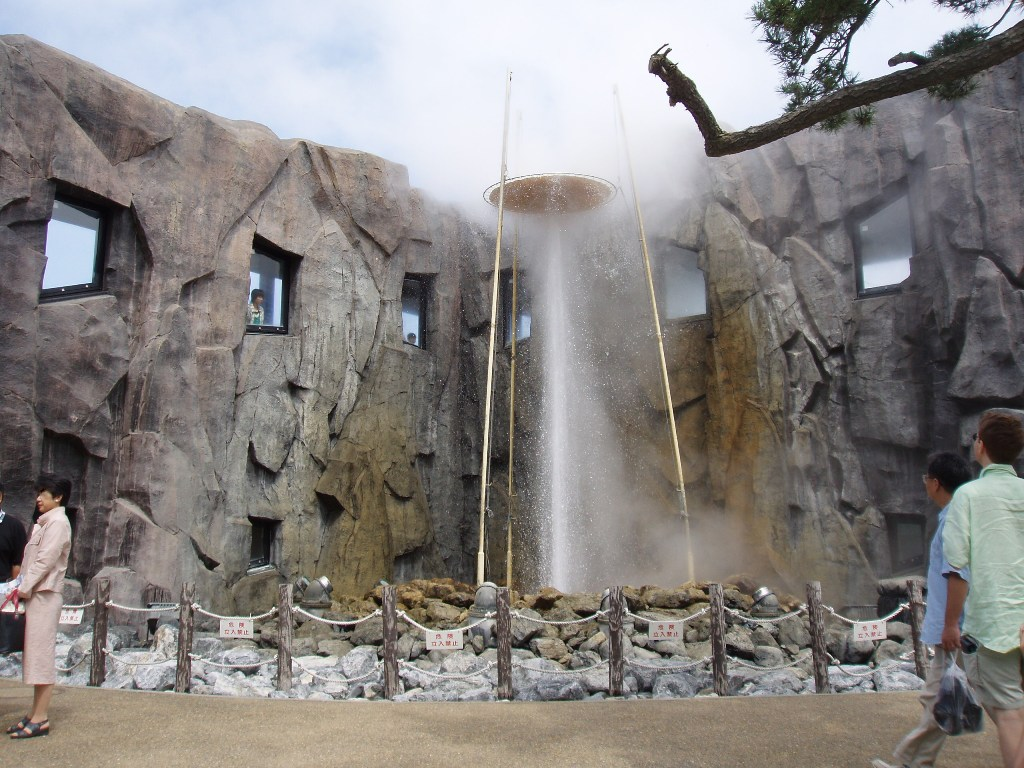 北海道鹿部町しかべ間歇泉公園